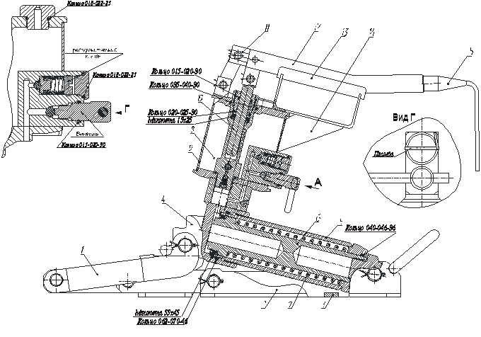 Схема рихтовщика гидравлического ГР-12Б